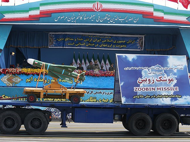 موشک هواپرتاب سوخت جامد هدایت اپتیکی که دارای برد ۲۰ کیلومتر و وزن ۵۶۰ کیلوگرم و ۳۶۰ کیلوگرم کلاهک است. این موشک از فانتوم پرتاب می شود